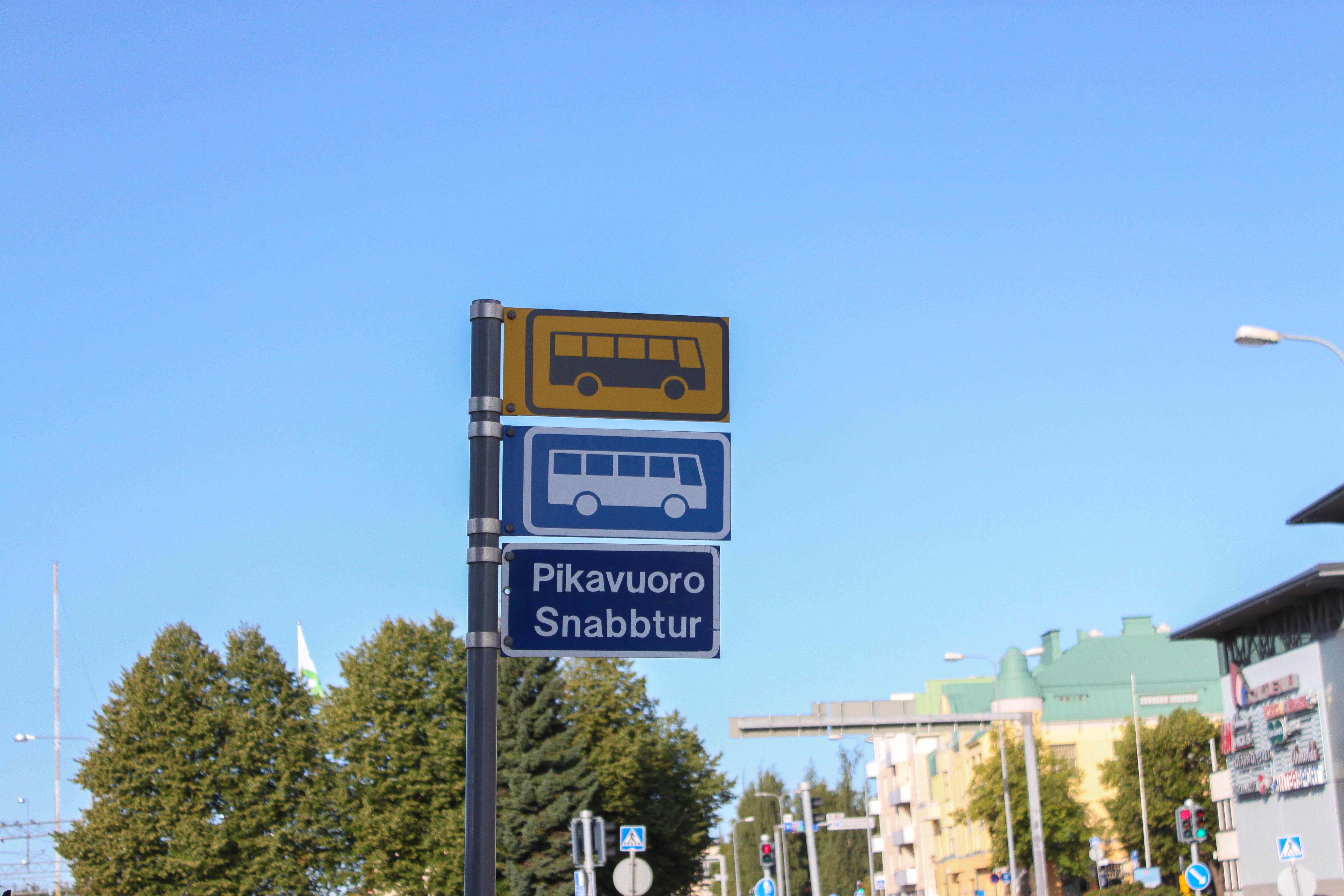 Linja-automerkit. Ylhäältä alas: lähiliikenne, kaukoliikenne ja pikavuoro-lisäkyltti.